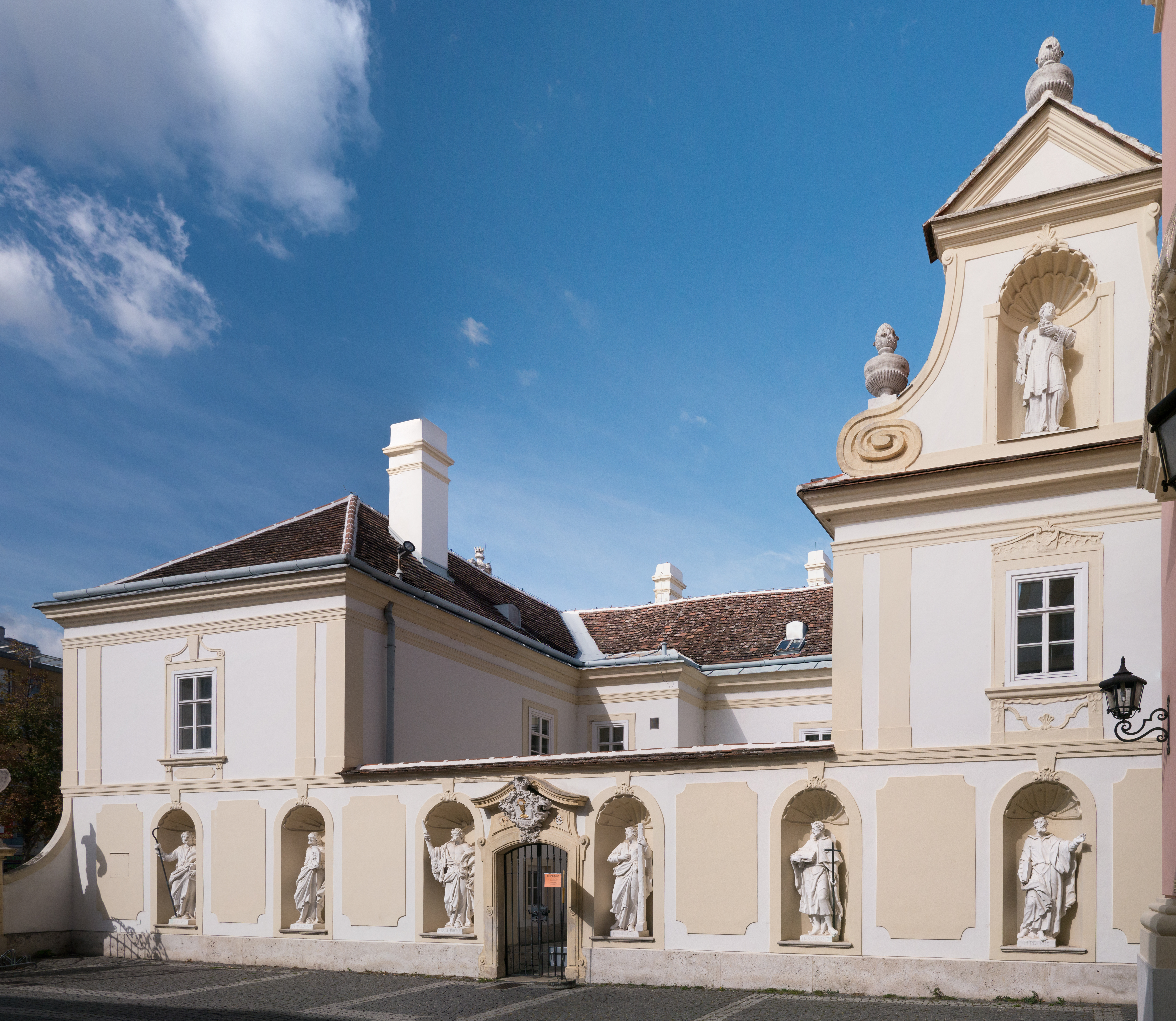 Kath. Pfarrkirche hl. Jakob und Pfarrhof